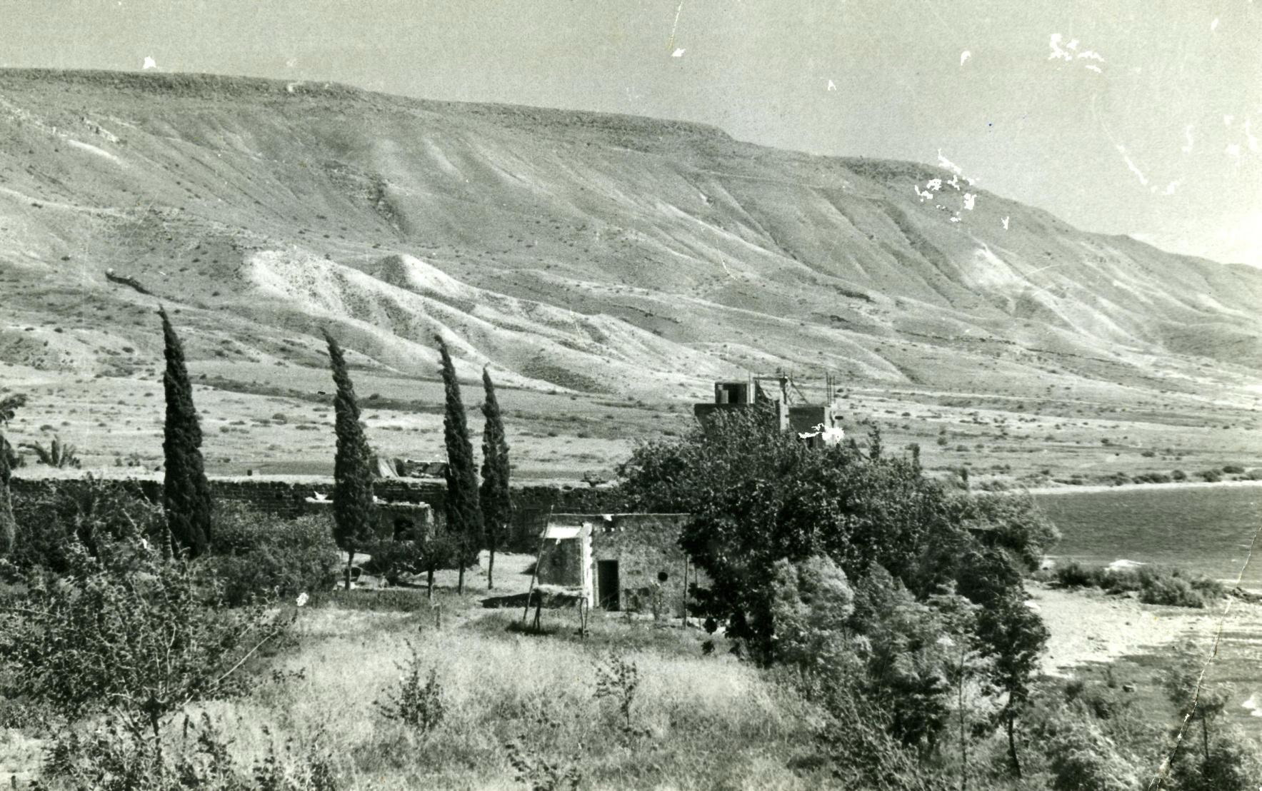 החווה בנוקייב מדרום לקיבוץ עין גב, מבט מכיוון צפון